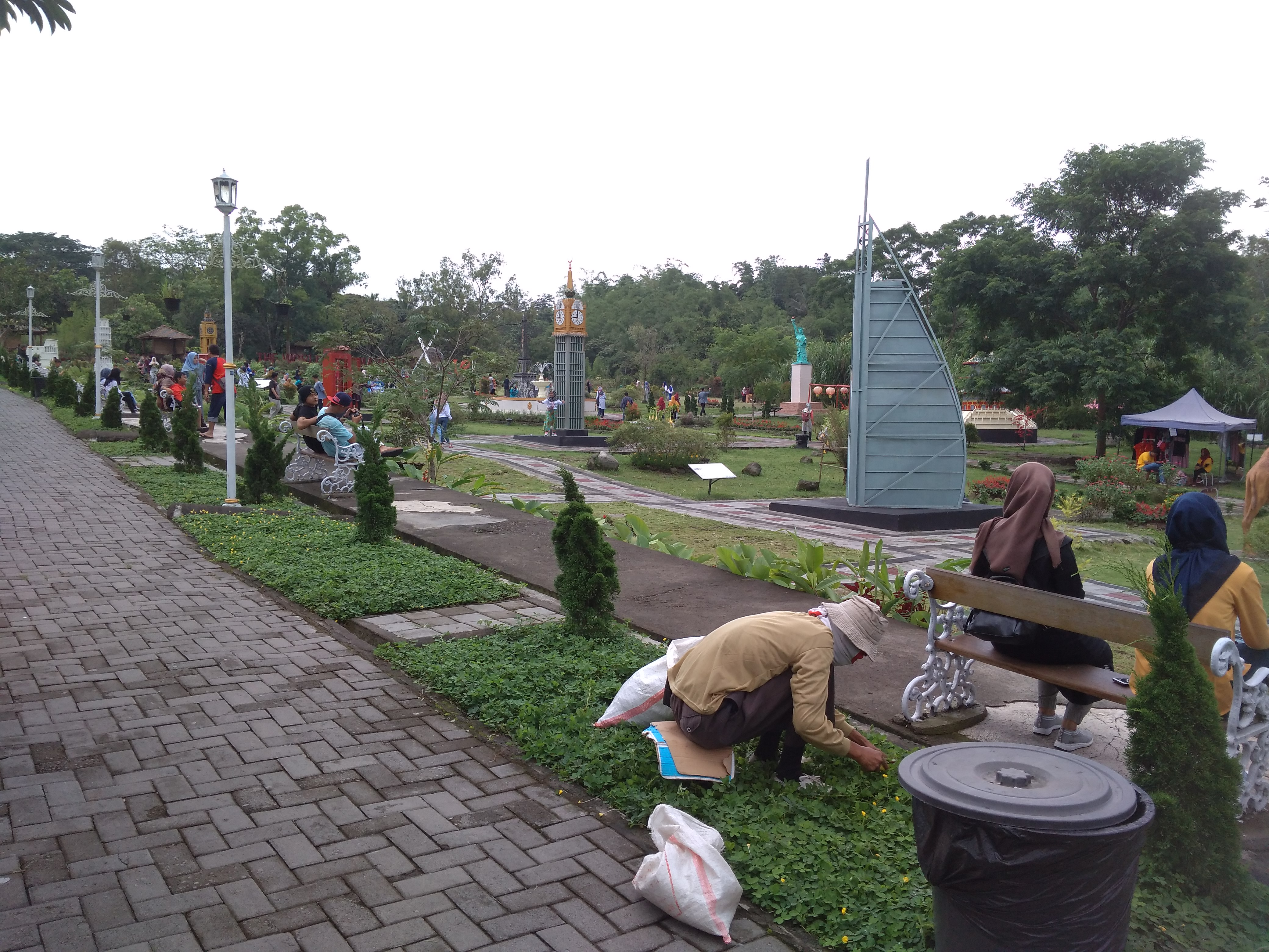 Gambar spot foto yang ada di Merapi Park